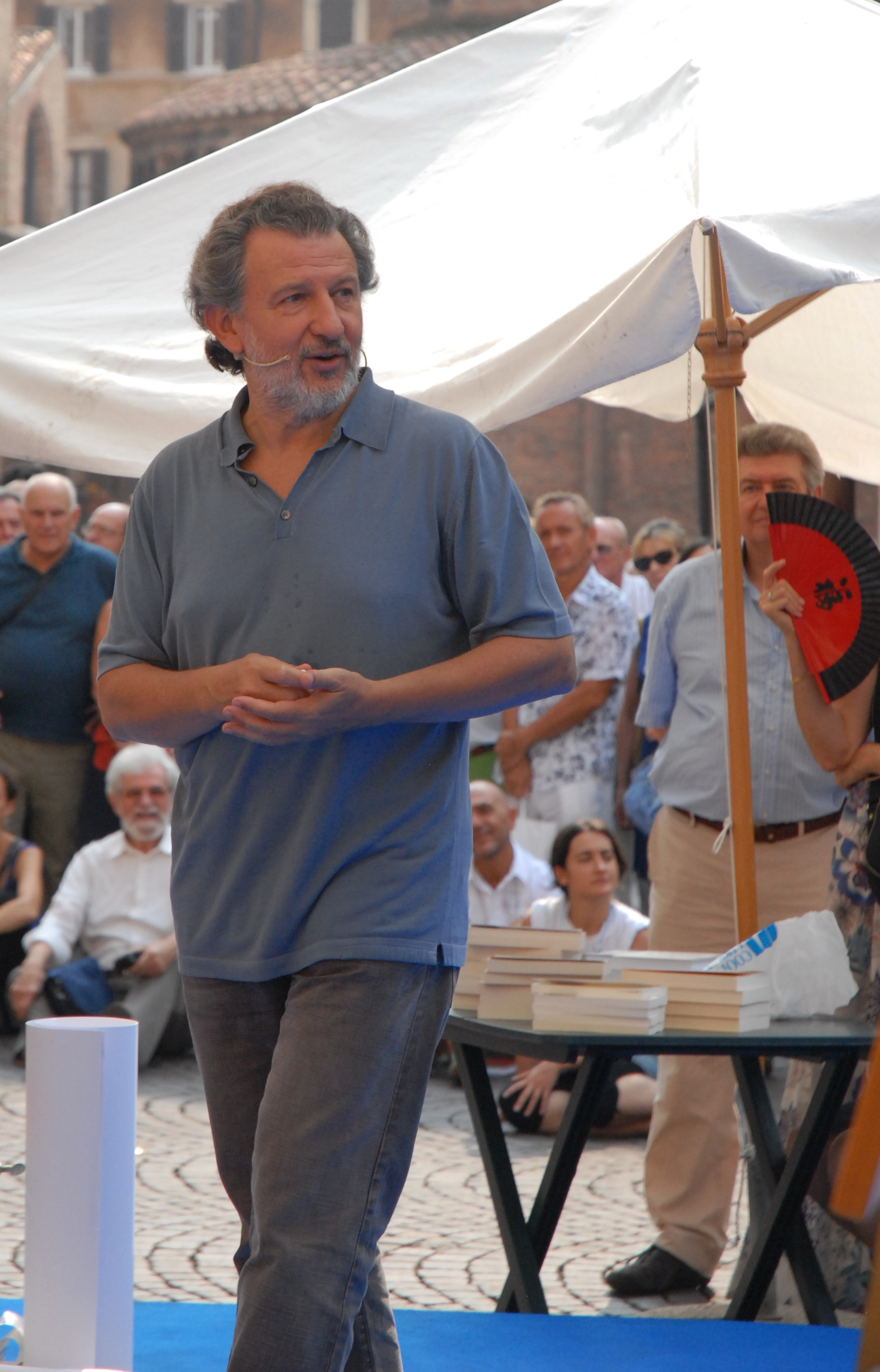 Perdere la faccia con la matematica?